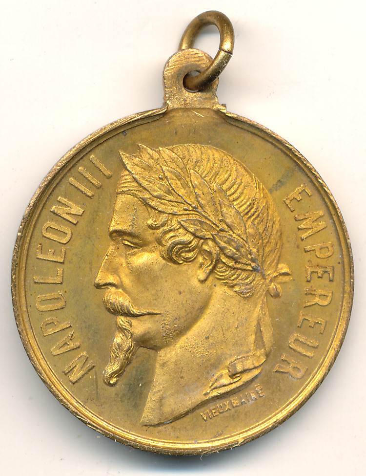 Médaille en bronze doré frappée pour le plébiscite du 8 mai 1870, 35mm.